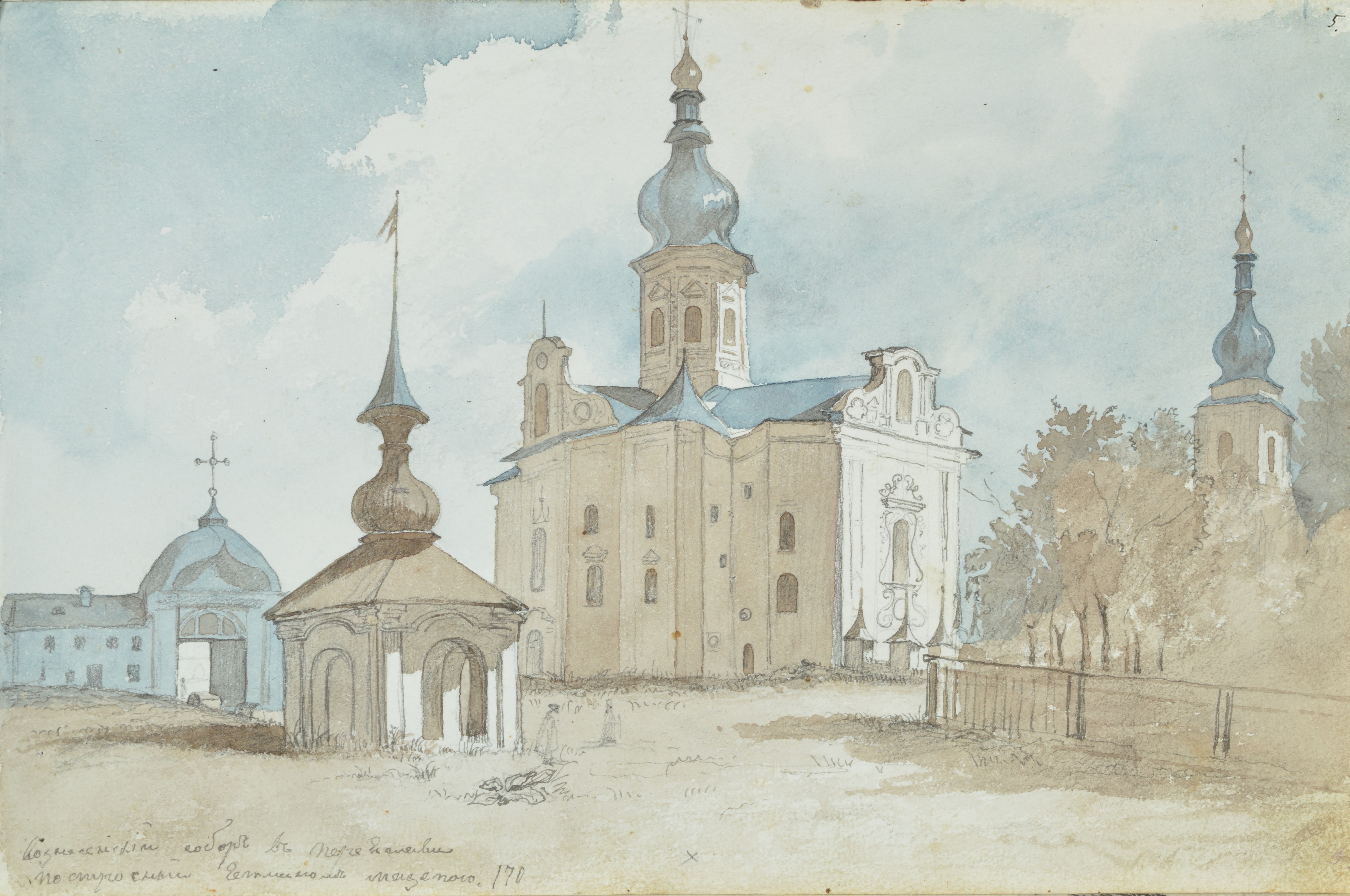 Тарас Шевченко. Альбом 1845 р. Арк.5